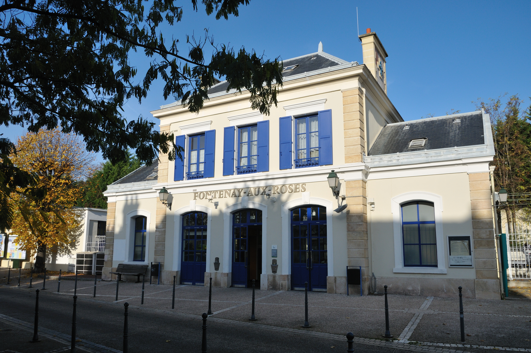 Gare de Fontenay-aux-Roses, Hauts-de-Seine, France